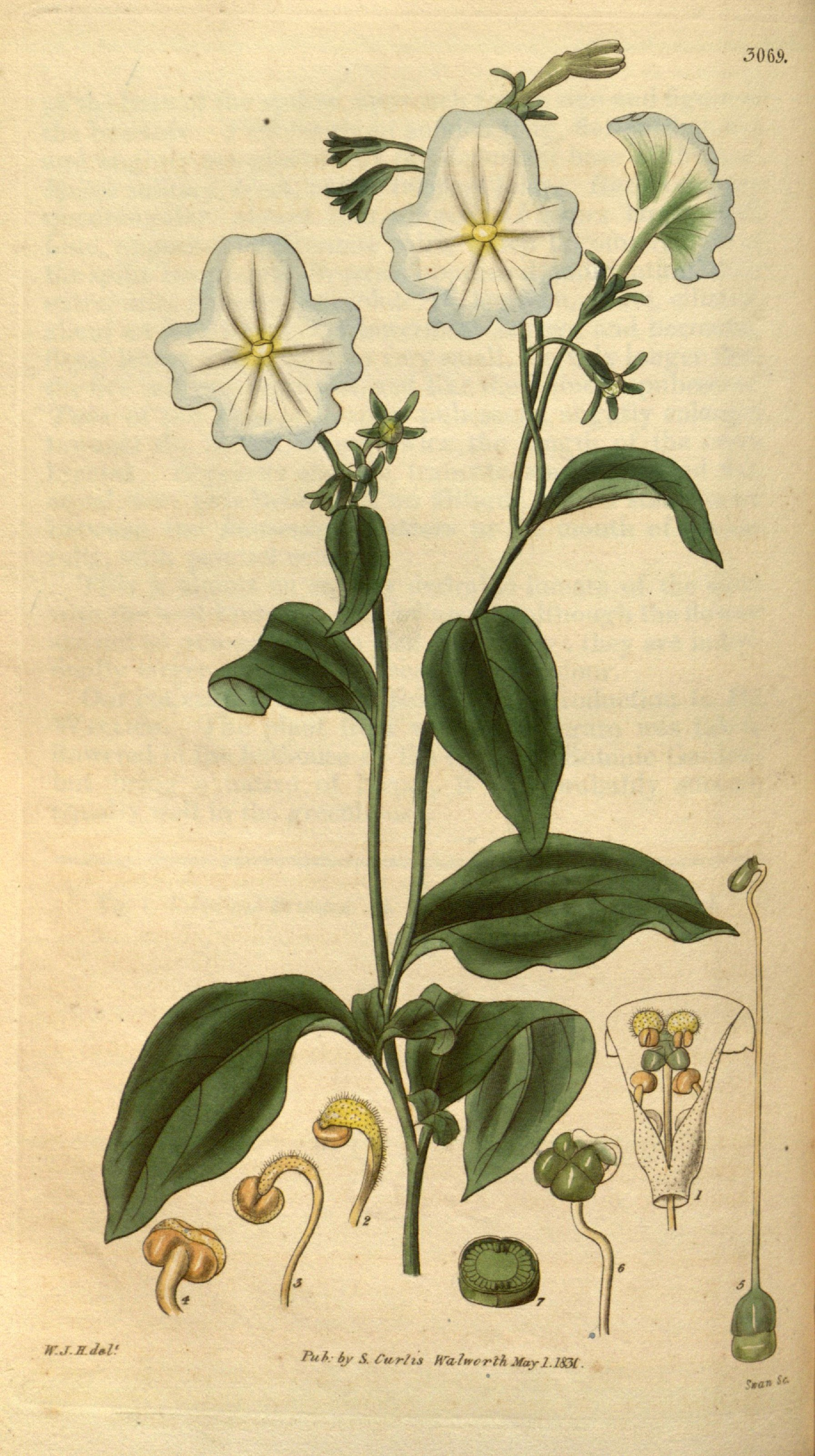 J06A tr.j.EJ»i /'"/£,- S. r„r/,.i H r a/nirr-th May 1.1831.